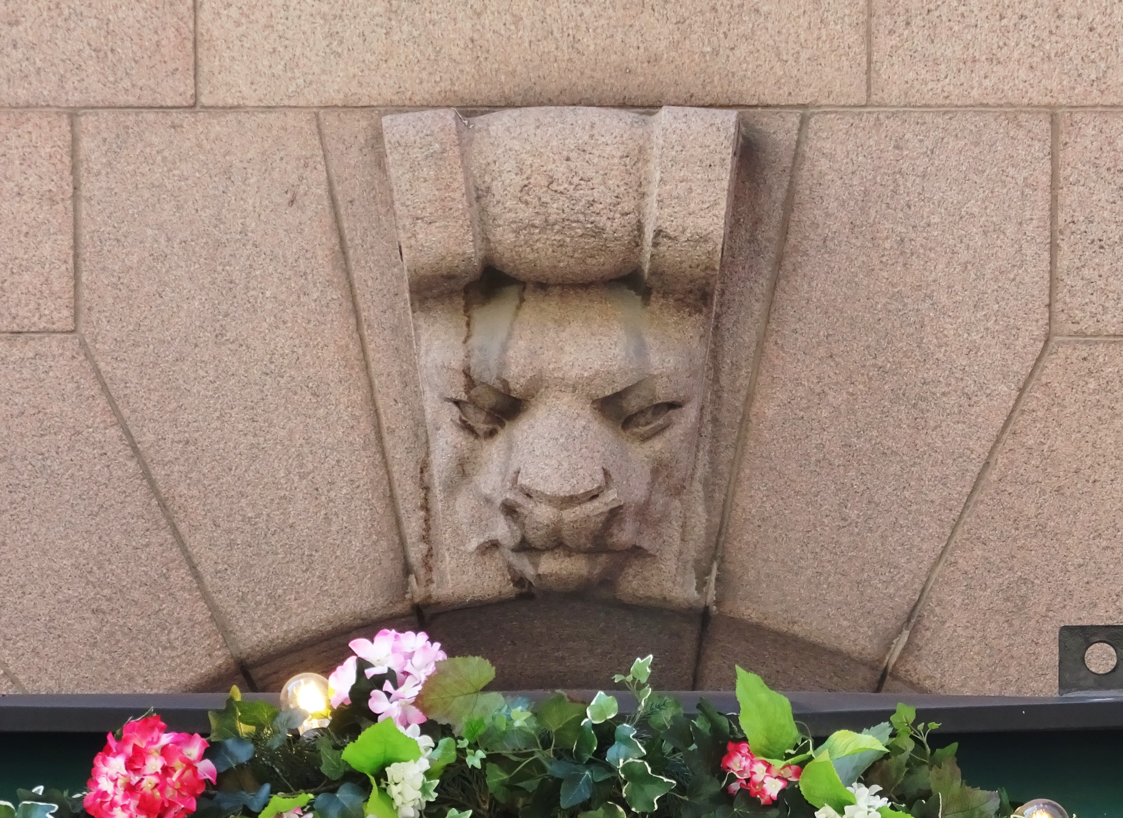 Drottninggatan 15, kvarteret Loen, lodjurshuvud, som är en symbol för kvarteret.